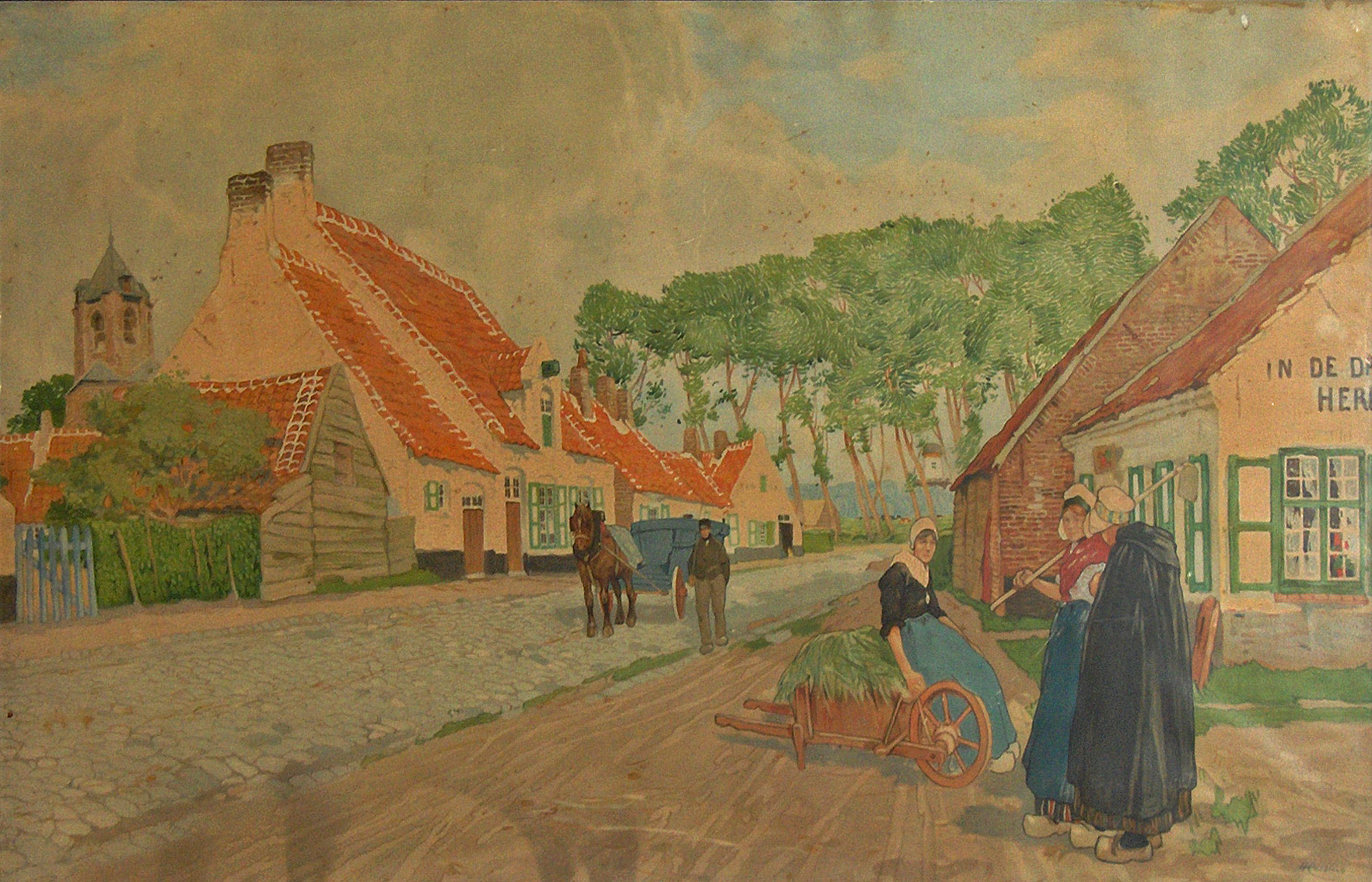 "Geanimeerde landelijke straat in Zeeland", chromolitho, getekend,door Henri Cassiers (1858-1944); privébezit